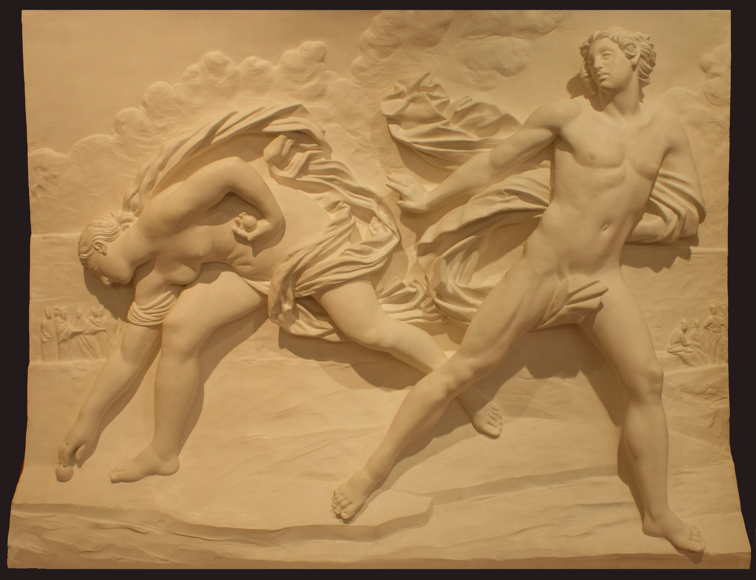 Atalanta e Ippomene - Guido Reni (Bassorilievo tattile del "Museo Anteros")